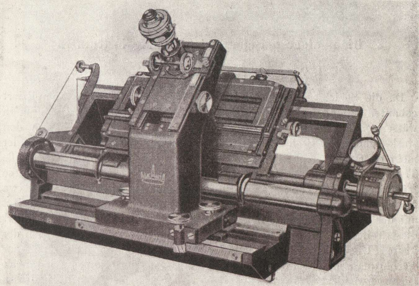 Askania Koordinaten-Meßgerät zum hochpräzisen Ausmessen von Fotoplatten, in diesem Fall von Spektrogrammen aus den Bereichen Wissenschaft und Forschung (aufgrund des Askania-Firmenlogos sehr wahrscheinlich aus der Zeit nach 1921)